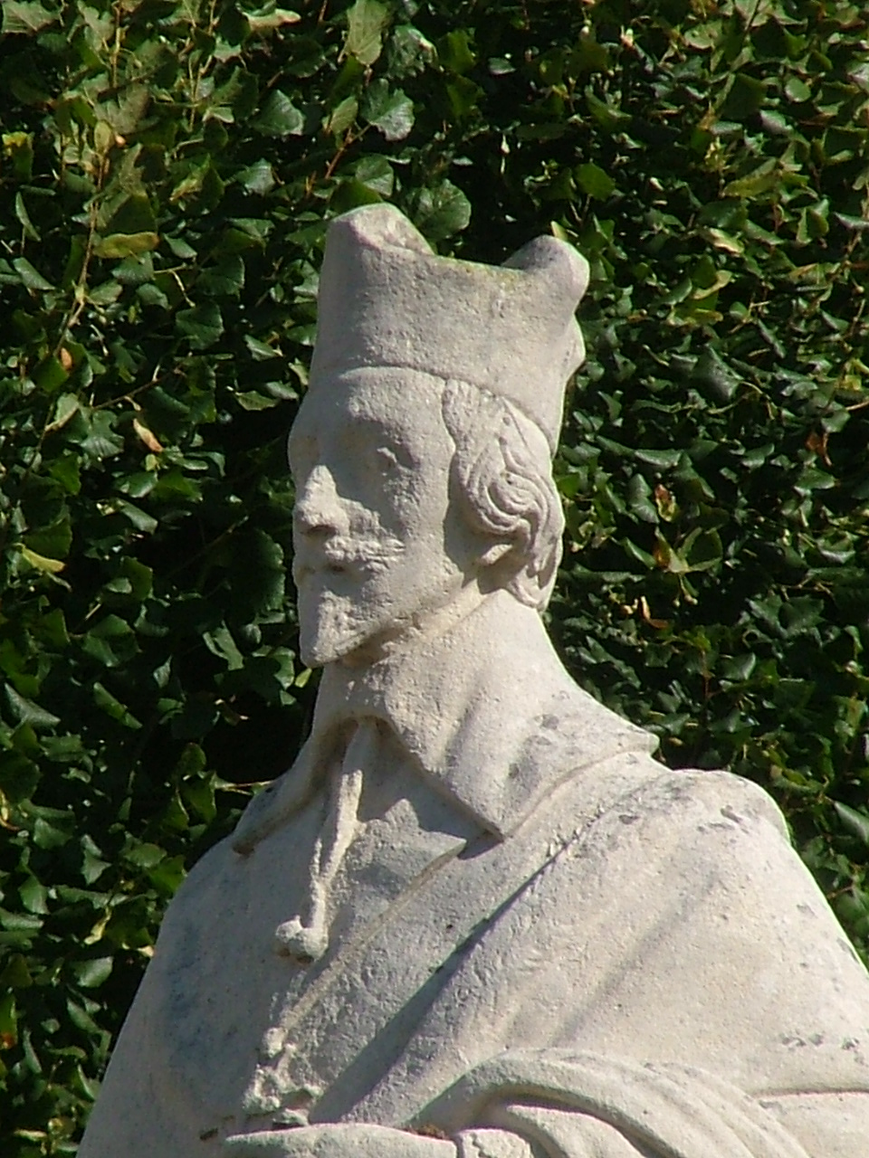 Richelieu évêque de Luçon qui a ordonné la construction de la cathédrale actuelle